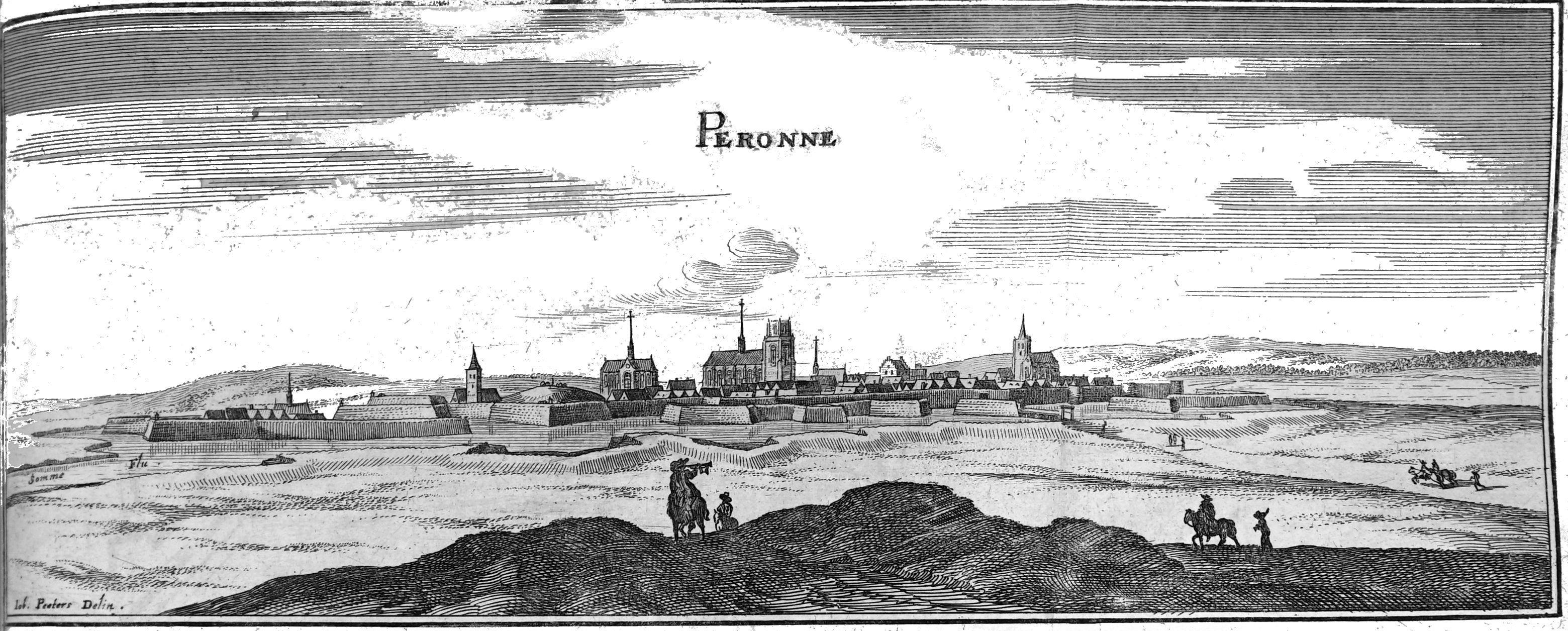 dessin provenant de "Topographia Galliae".